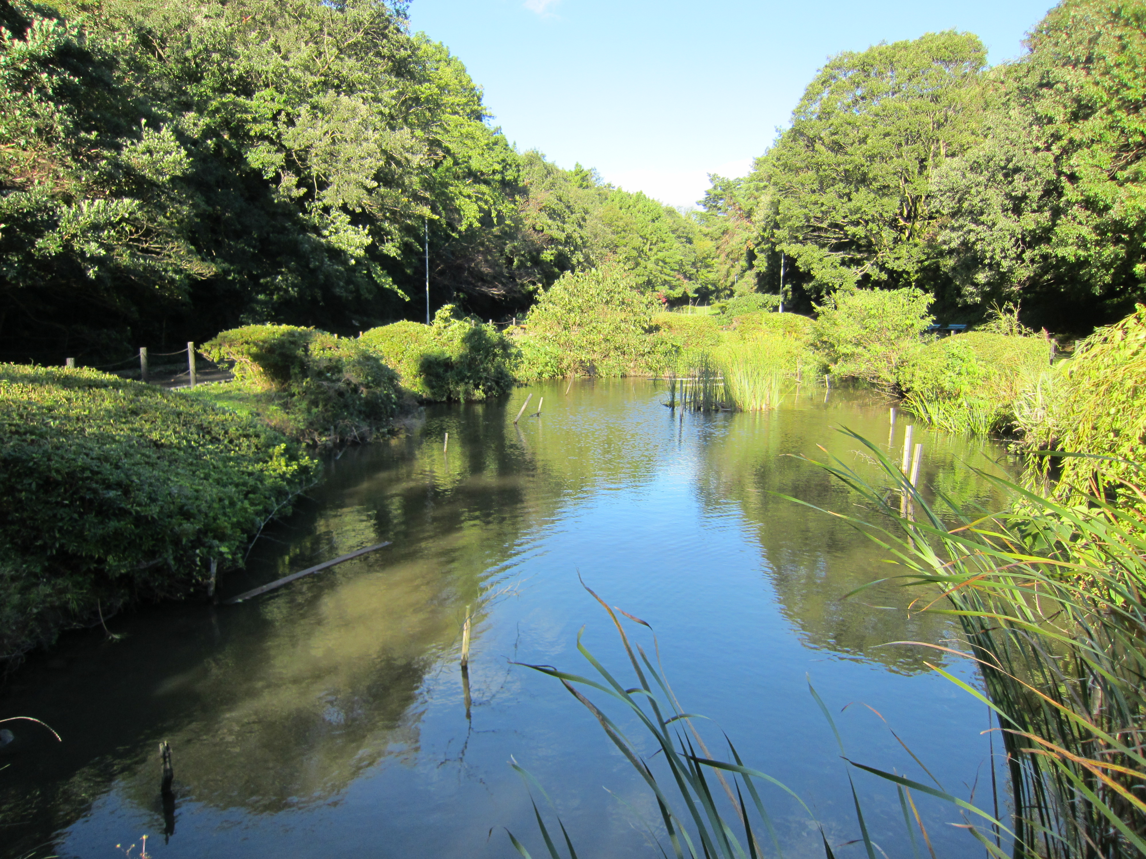 有玉緑地公園の池